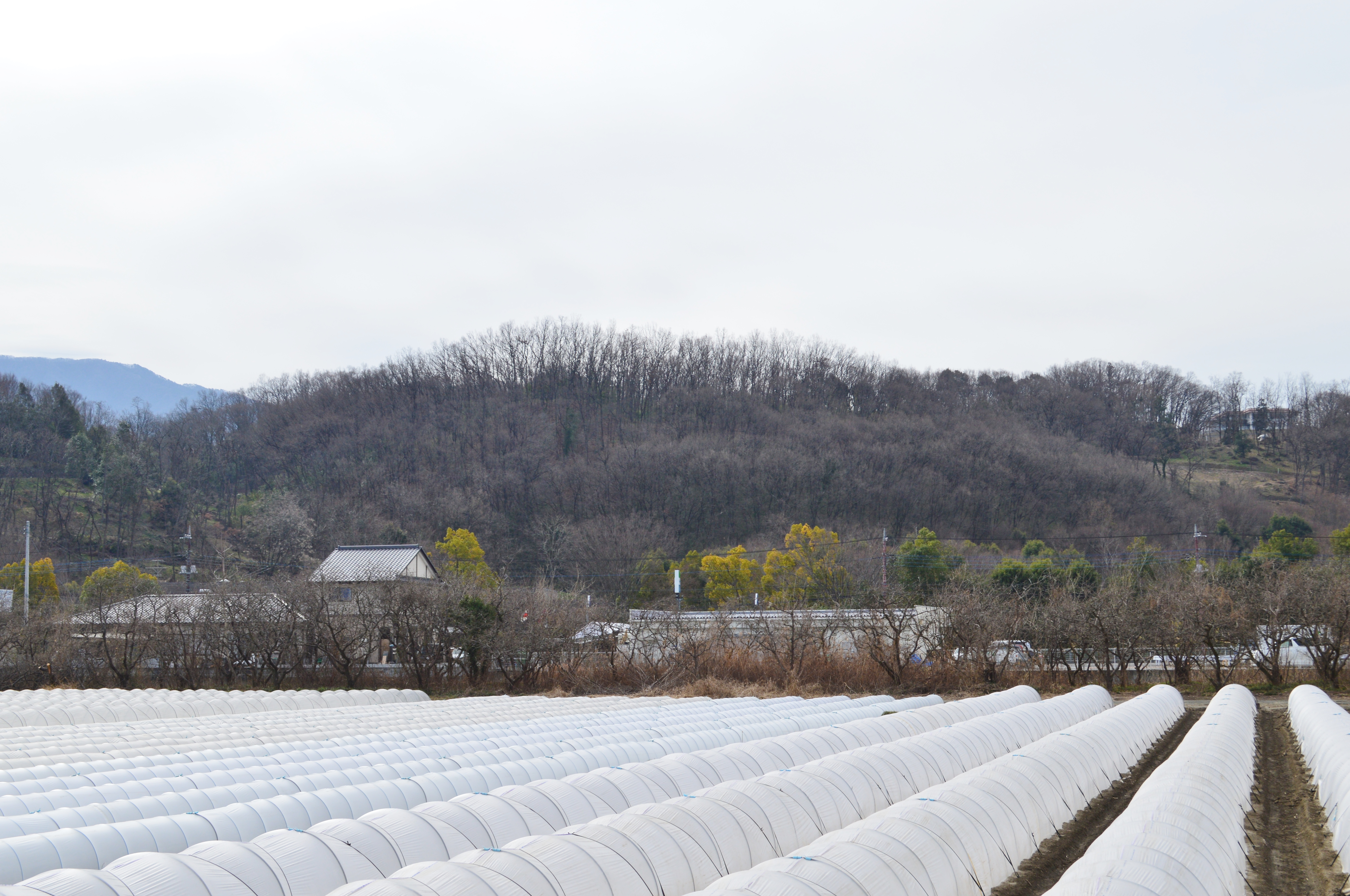 大丸山古墳 遠景 Nikon D3200